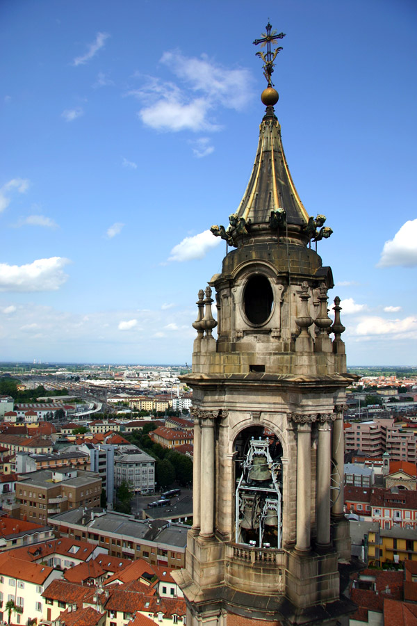 Il campanile della basilica visto dall'alto della Cupola di San Gaudenzio